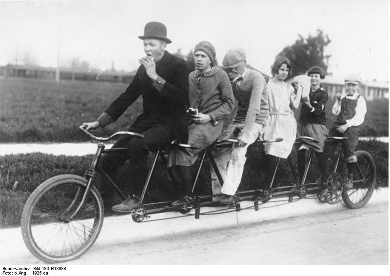 Tandem-Fahrrad ADN-ZB/Archiv Ein Familien-Tandem für 6 Personen aus dem Jahre 1925. 1042-25